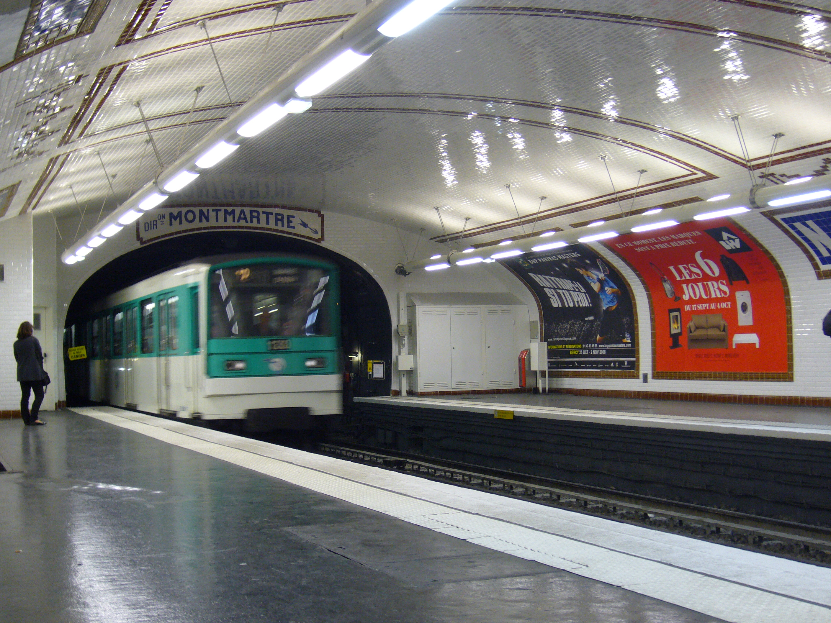 Un MF 67 entre dans la station Notre-Dame-des-Champs sur la ligne 12 du métro de Paris.